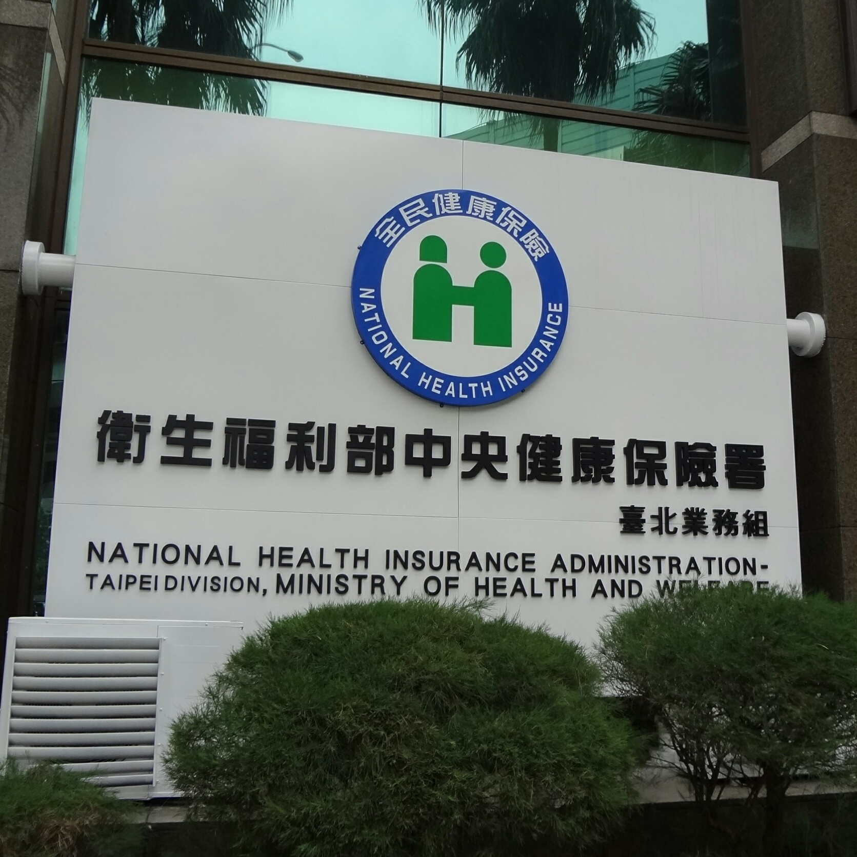 中華民國衛生福利部中央健康保險署臺北業務組第三辦公室銘牌，位於臺北市中山區中山北路一段7號1樓（興南吉發商業大樓）。